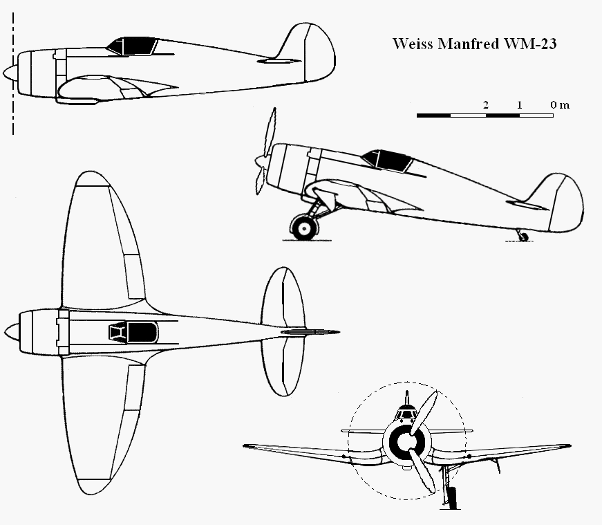 Weiss Manfred WM-23 magyar tervezésű vadászgép nézeti rajza.